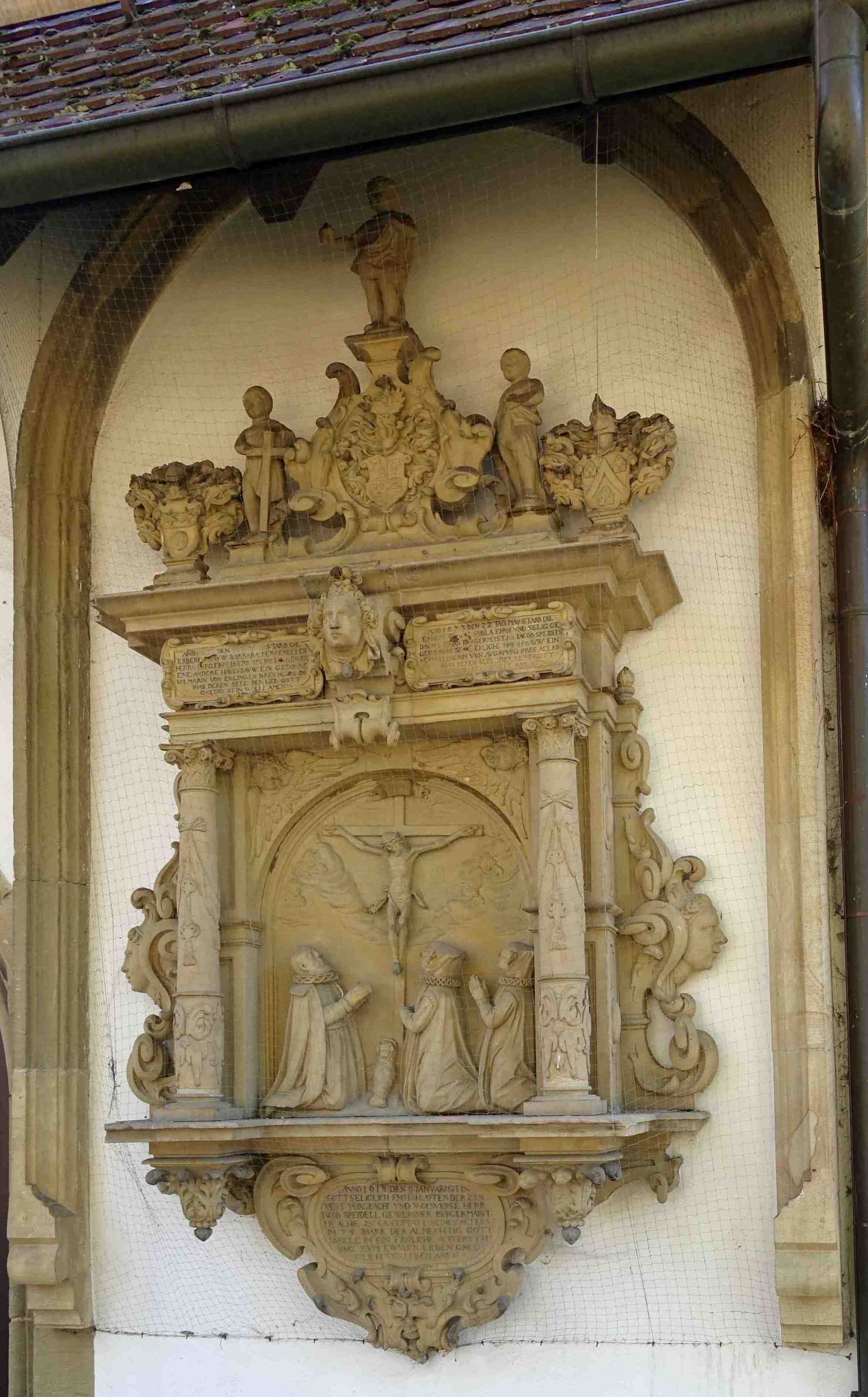 Epitaph an der Nordseite der Uffkirche auf dem Uff-Kirchhof in Stuttgart-Bad Cannstatt für den Cannstatter Bürgermeister Jakob Speidel (1538–1613), seine erste Frau Sybille Neuhäuser aus Augsburg († 1573) und seine zweite Frau Barbara Vollmar aus Esslingen († 1617).